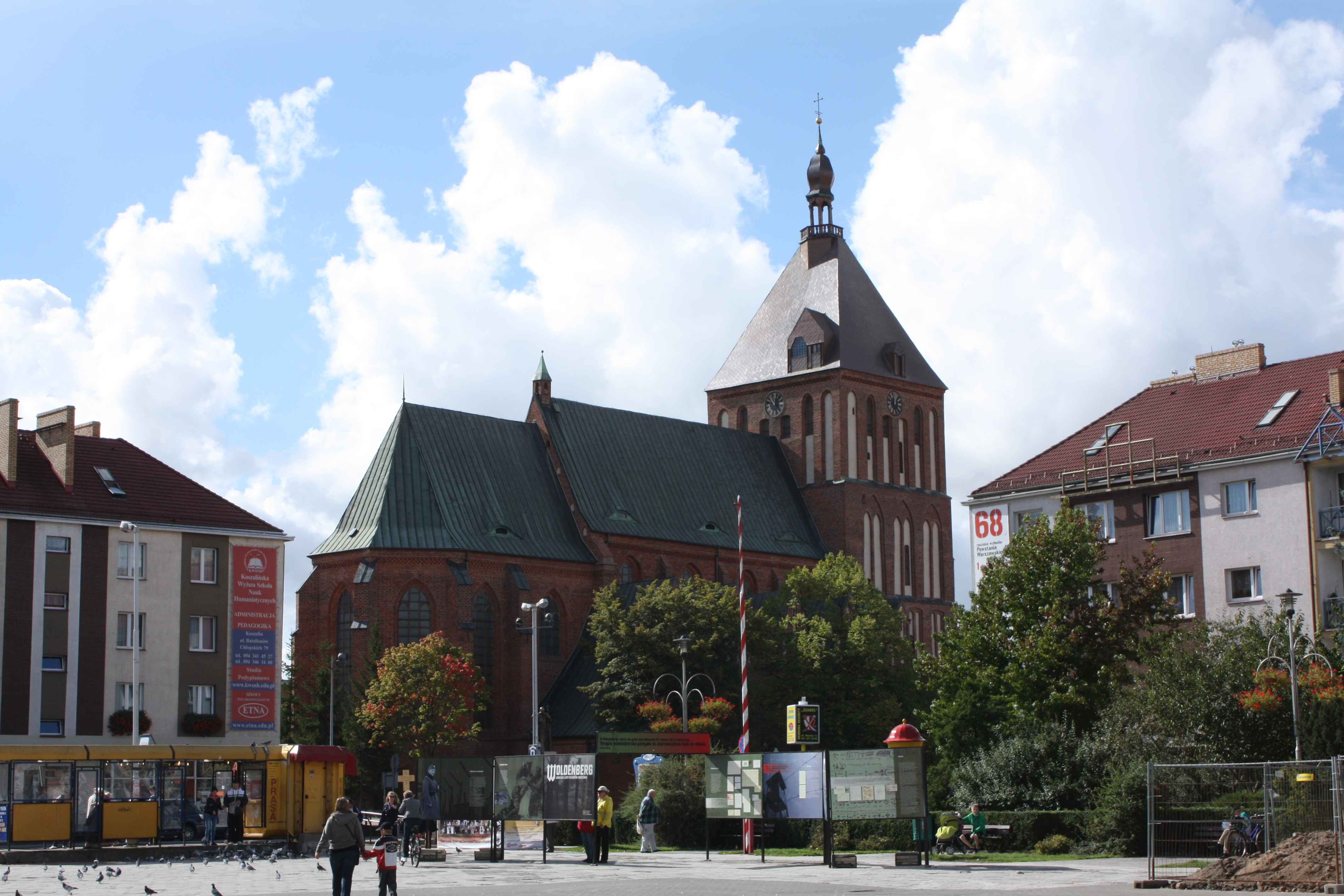 Kościół katedralny p.w. Niepokalanego Poczęcia NMP przy ul. Władysława Laskonogiego 4 w Koszalinie